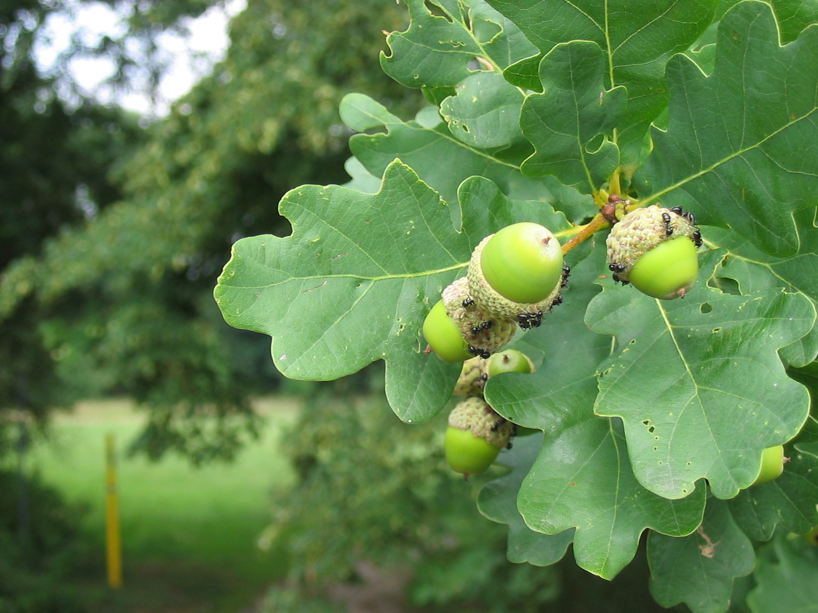 Laub und Früchte einer Stieleiche (Quercus robur). Der Pflanzensaft der Eicheln dient Schwarzen Wegameisen (Lasius niger) als Nahrungsquelle.